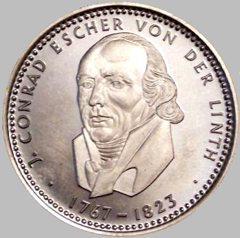 Gedenkmüze mit Hans Conrad Escher von der Linth